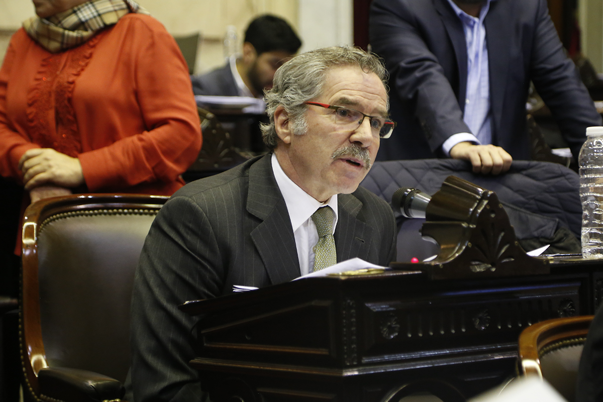 Sesión de la Cámara de Diputados Argentina por la despenalización del aborto. Diputado Felipe Sola.